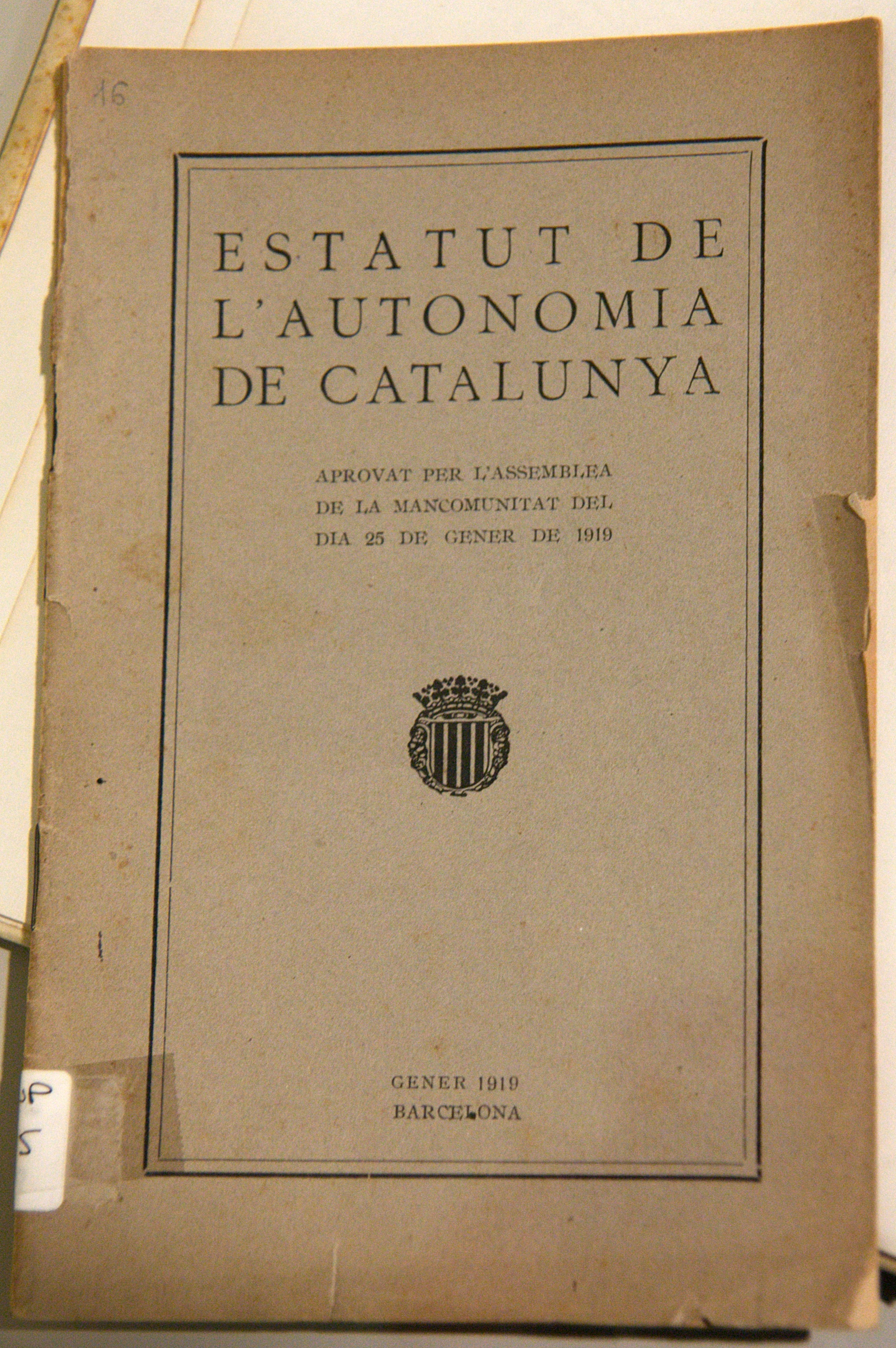 Portada del Projecte d'Estatut d'Autonomia de Catalunya de 1919